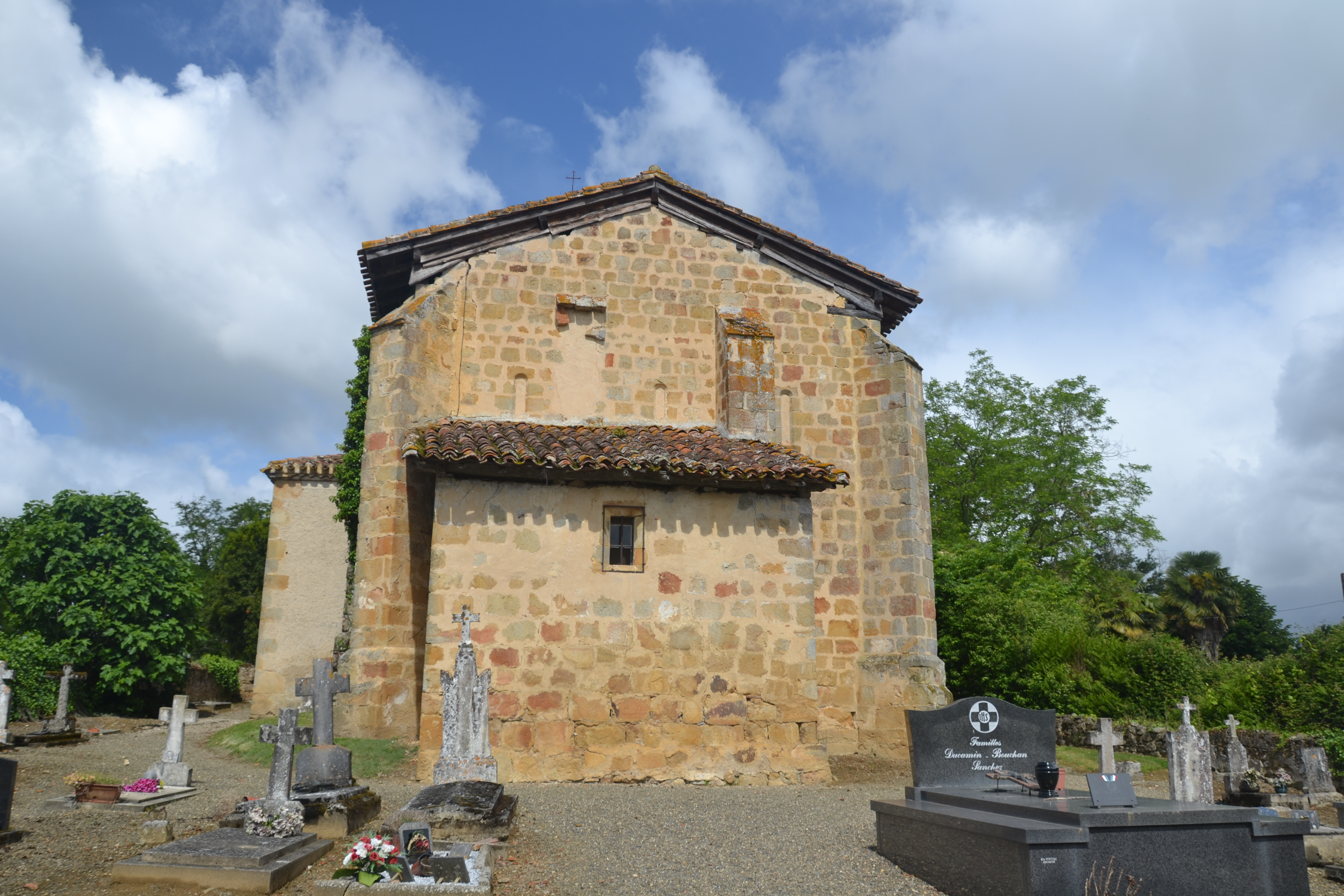 Abside de l'église Saint Griède